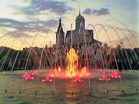 Церковь Казанской иконы Божией Матери (Реутов)